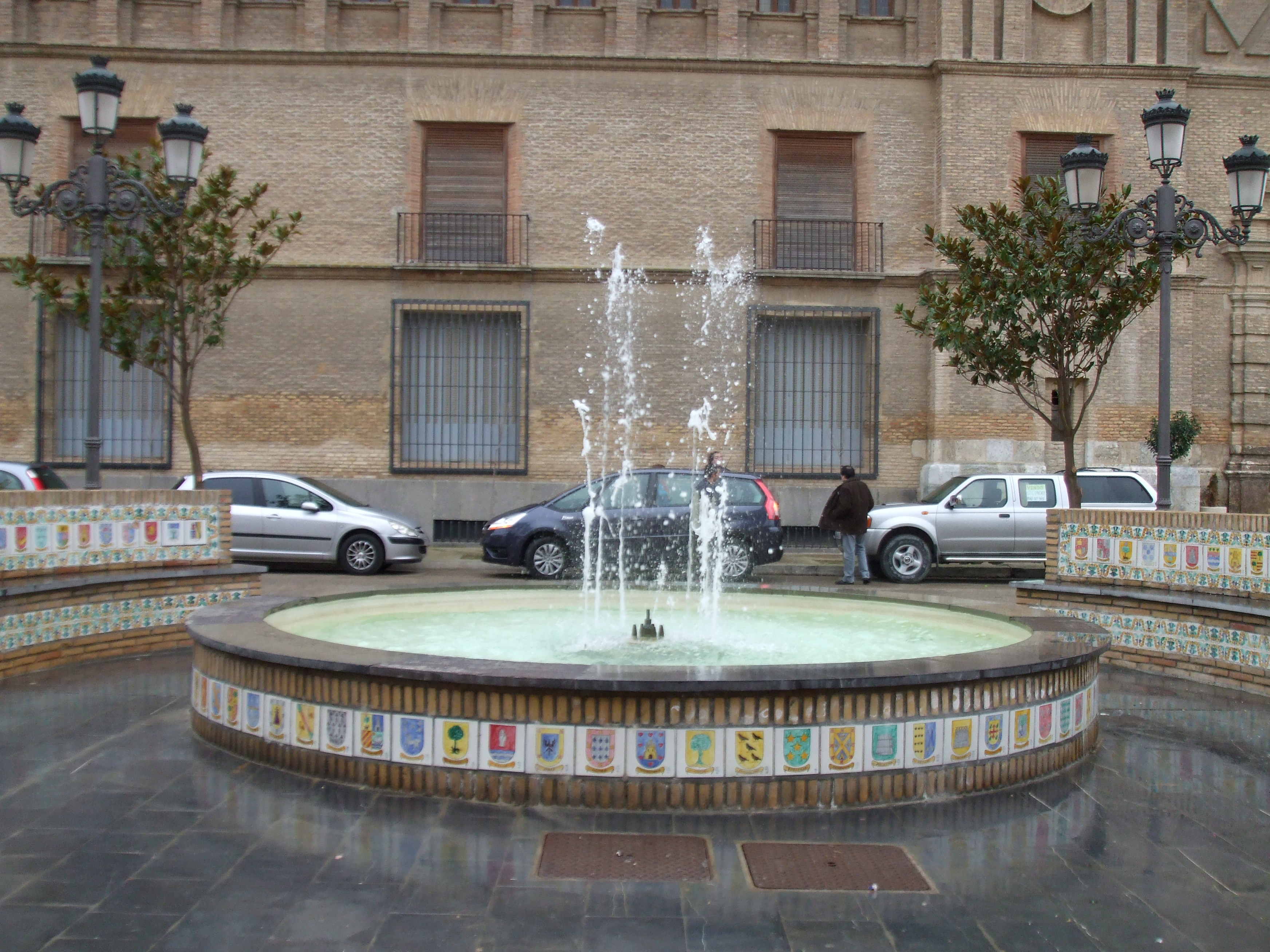 Fuente de la Plaza de España, con los escudos en cerámica de los apellidos de los habitantes. Al fondo Palacio del Marqués de Villafranca de Ebro, Villafranca de Ebro, declarado Bien de Interés Cultural con categoría de Monumento